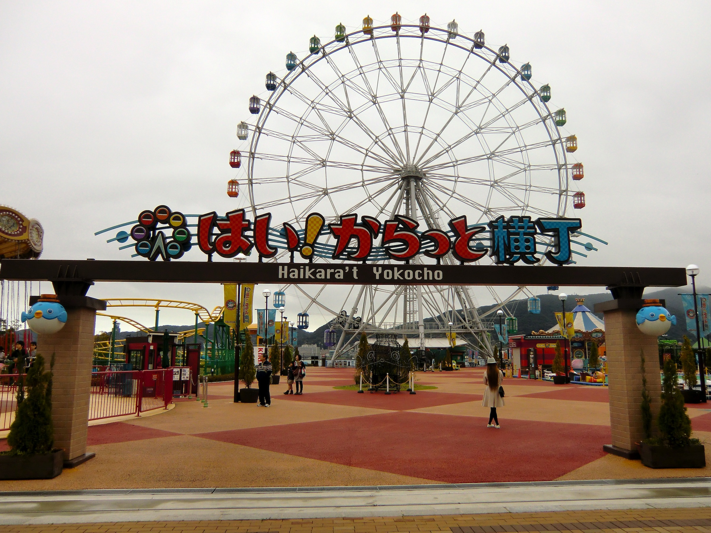 はい！からっと横丁の正面ゲートと観覧車（下関市）